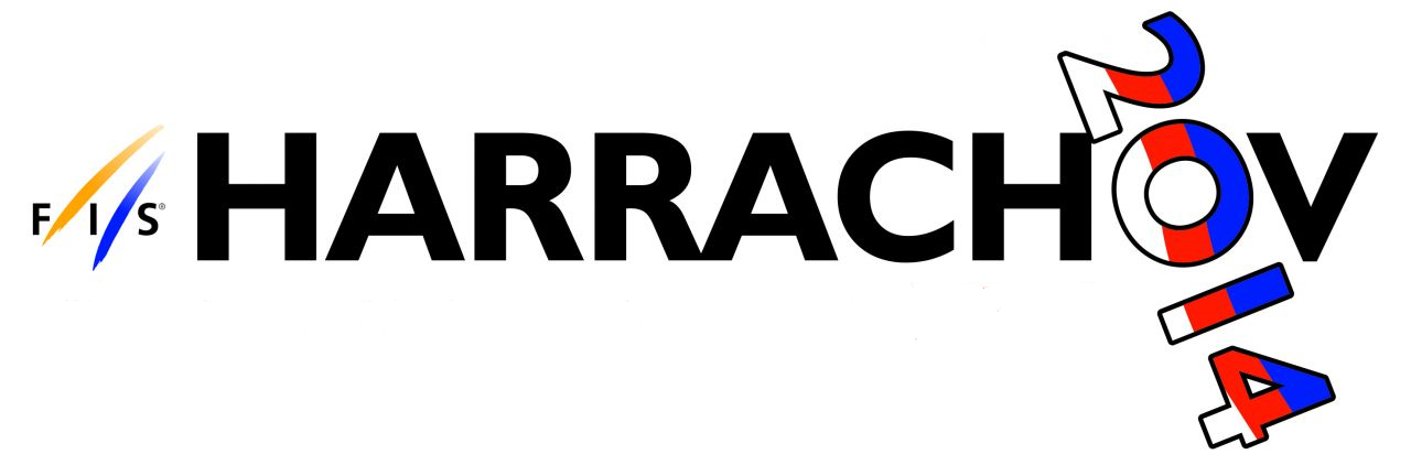 Logo der Skiflug-Weltmeisterschaft 2014